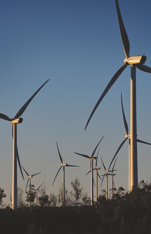 Vestas Windpark in Rio Maior, Portugal